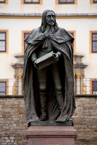 Gotha, Denkmal von Ernst dem Frommen